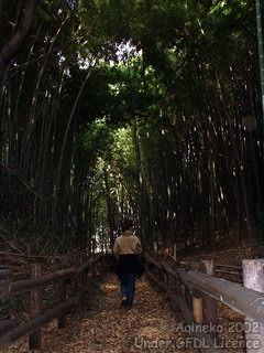 Description de l'image : Kozukue Source : Aoineko Statut : GFDL